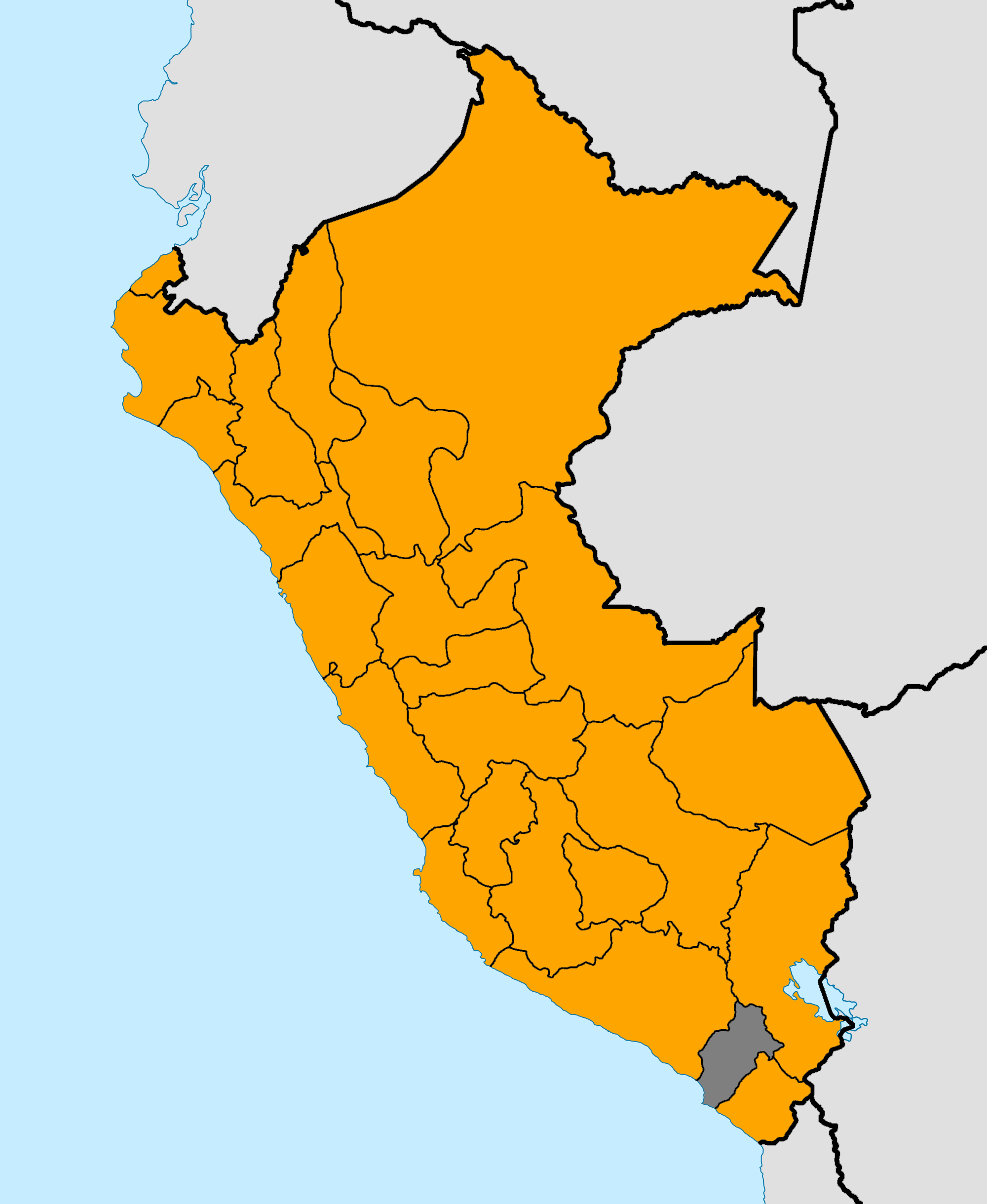 Candidato vencedor por departamento: en naranjo Peru 2000, en gris votos nulos